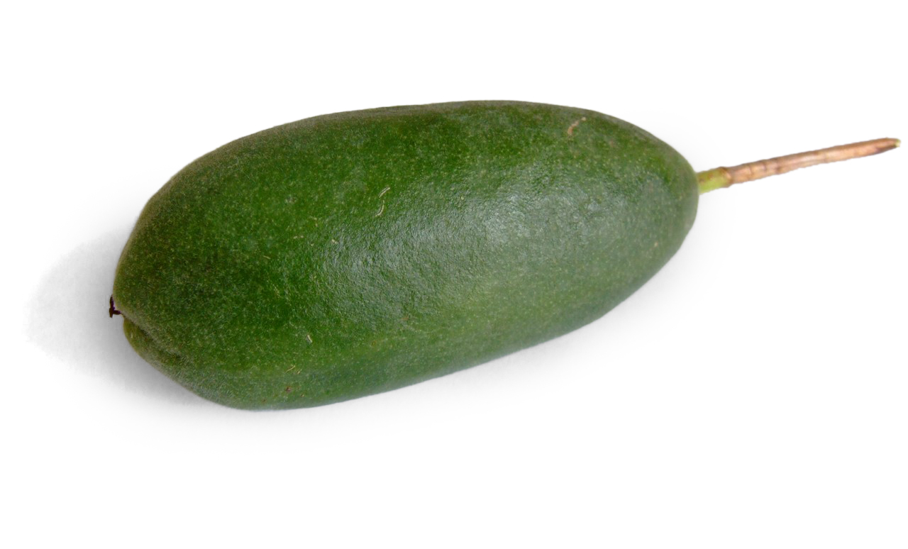 Curuba Frucht. Quelle: selbst fotografiert, 08/2006. Fotograf: Späth Chr.